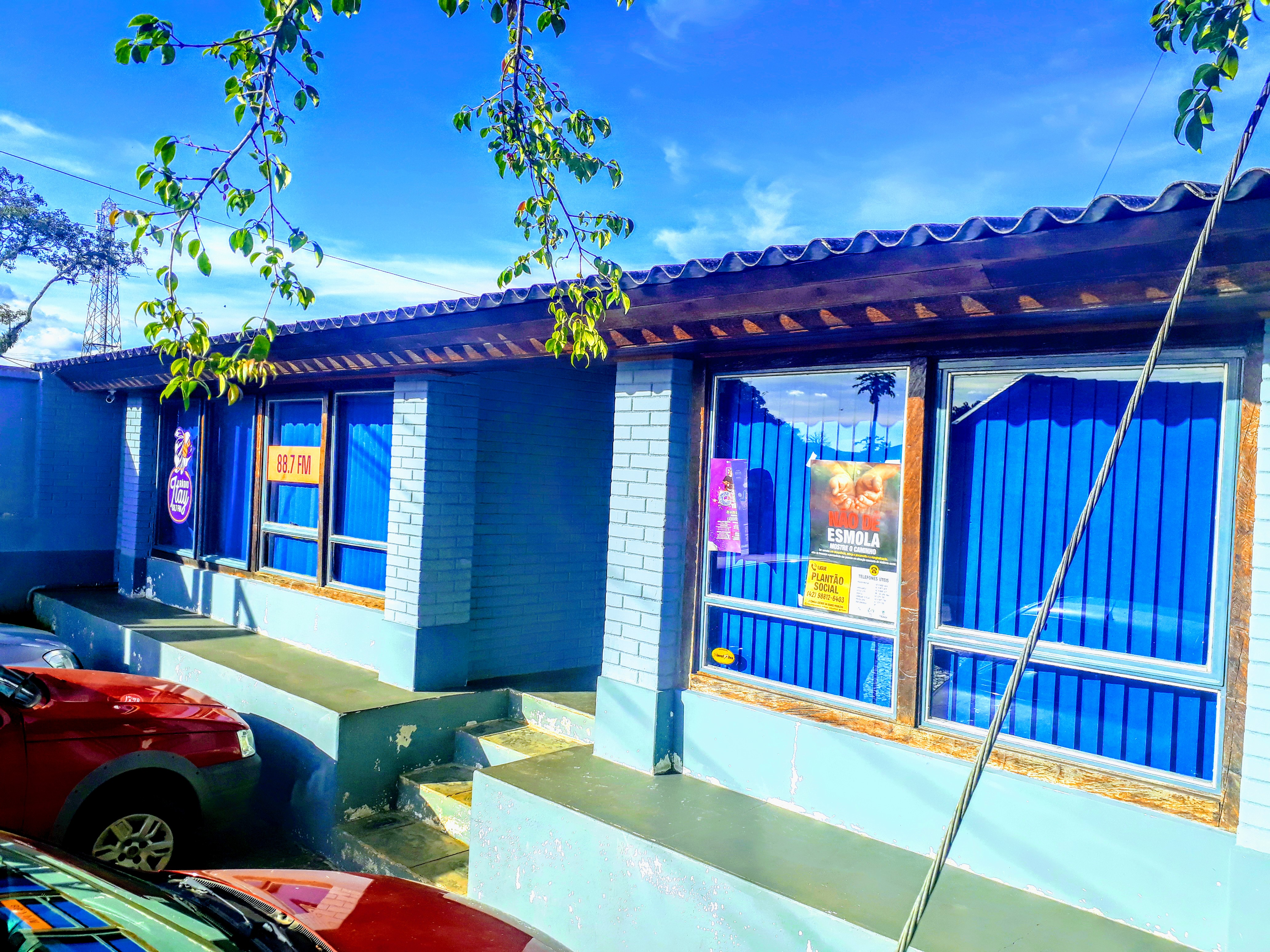 Tibagi, no Paraná.